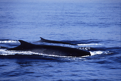 Finnwale